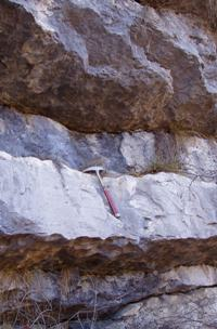 Autore: Francesco Mulas data: 02/12/2007 soggetto ritratto: affioramento del Gruppo dei Calcari grigi di Noriglio, Lias medio-inferiore luogo: dintorni di Lasino (TN) coordinate: 46°01′3.09″ N 10°58′45.58″ E Licenza: GFDL